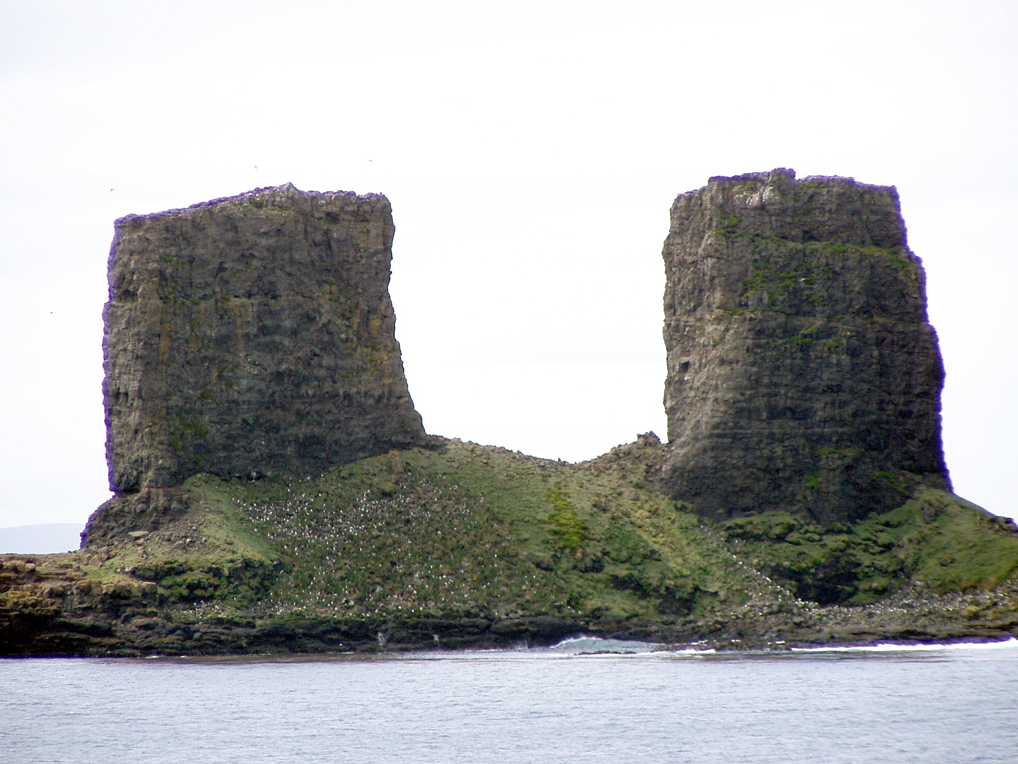 Lundi 1er septembre 2008, 6h30, arrivé à l’arche des Kerguelen, Il fait 1,9° et la température de la mer est de 2,8°